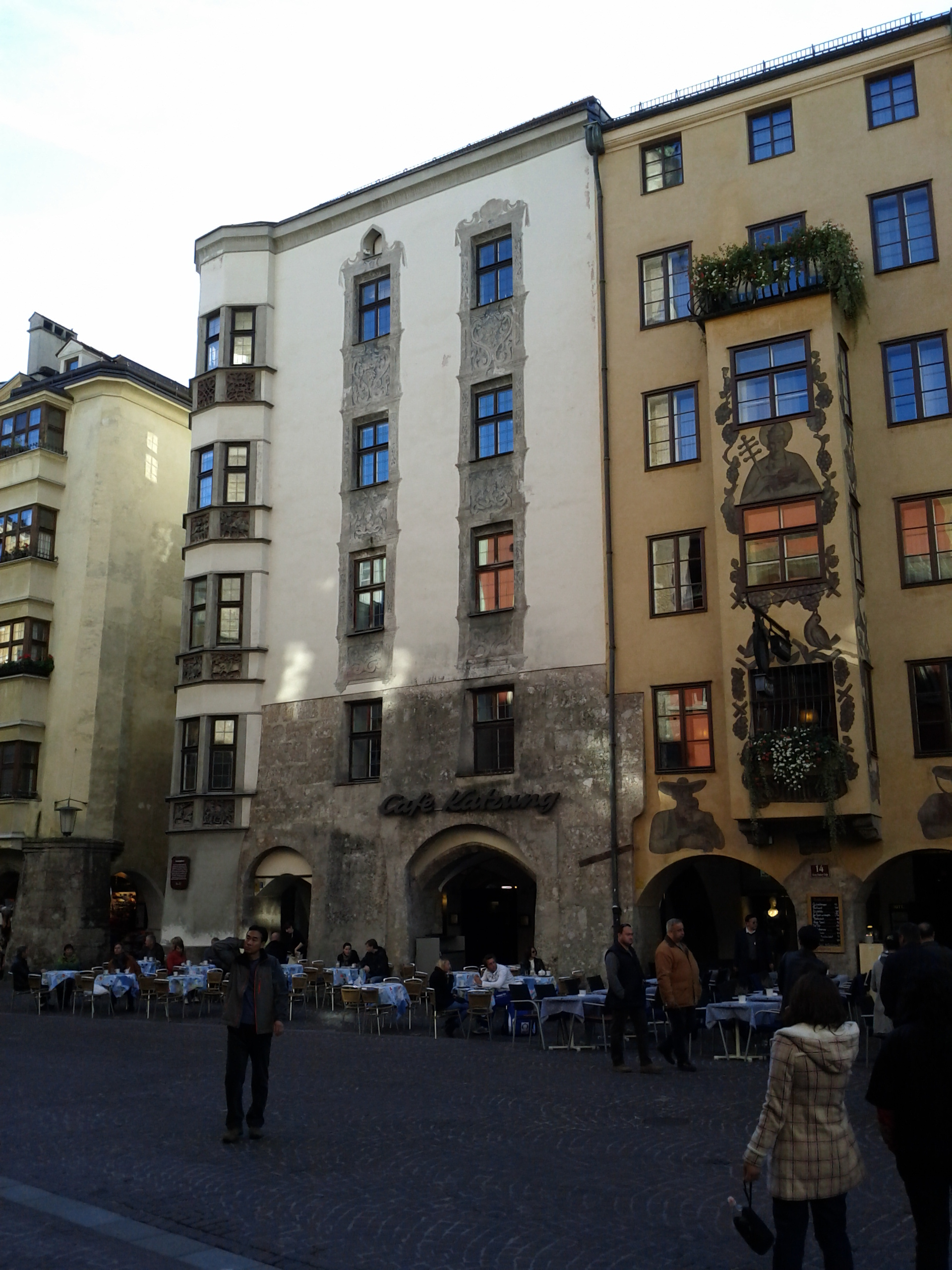 Innsbruck-Herzog-Friedrichstr16